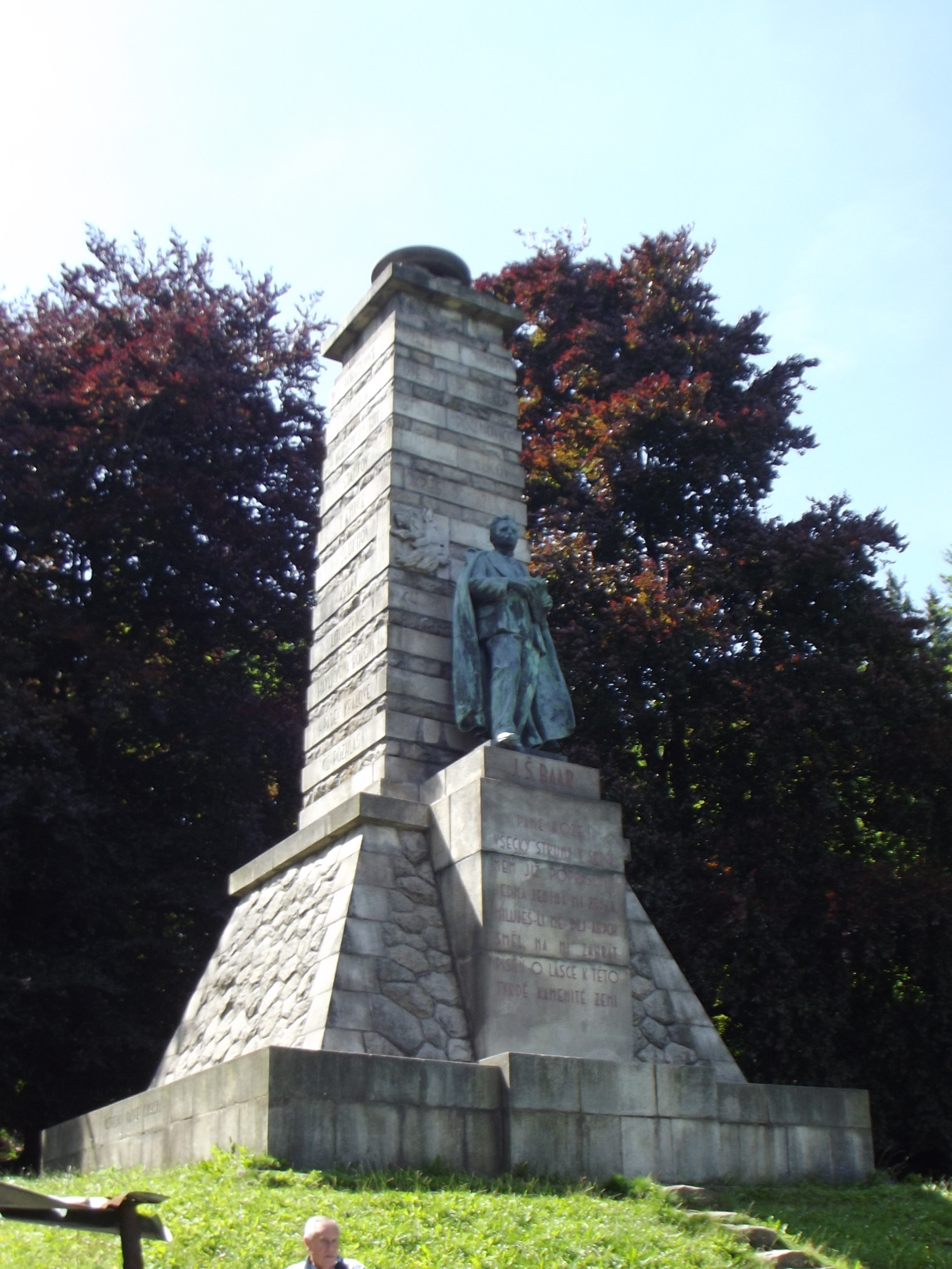 Výhledy - pomník (Jindřich Šimon Baar).